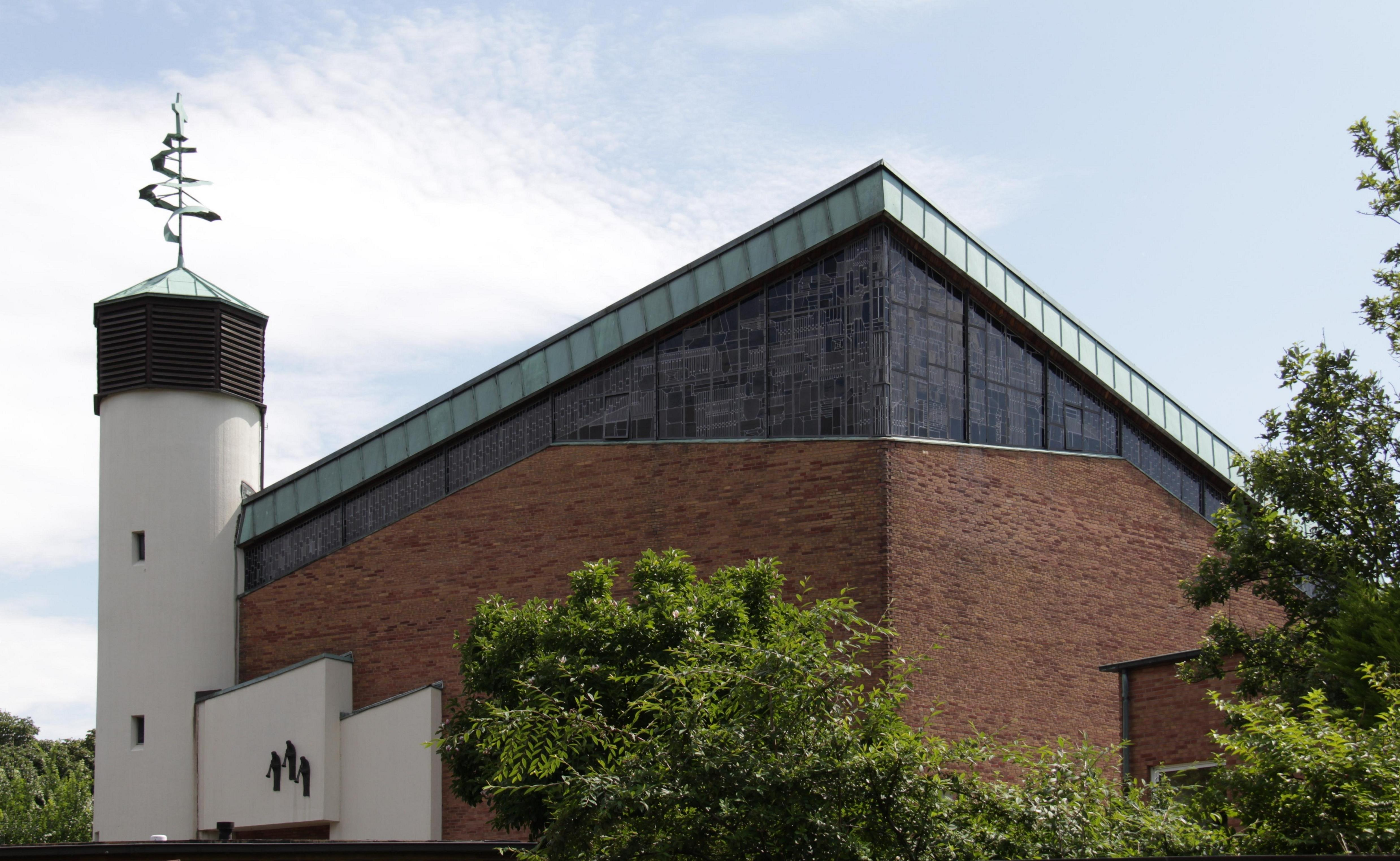 St.Stephanuskirche in Münster/Westfalen, Stadtteil Aaseestadt. Die Kirche ist leider komplett von Gebäuden und hohen Bäumen umgeben und somit schwierig zu fotografieren.